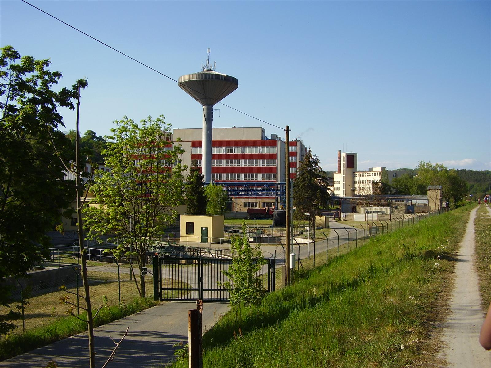 Chemička v Roztokách u Prahy